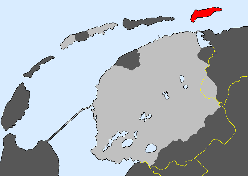 Taalgebiet fan it Skiermûntseagersk